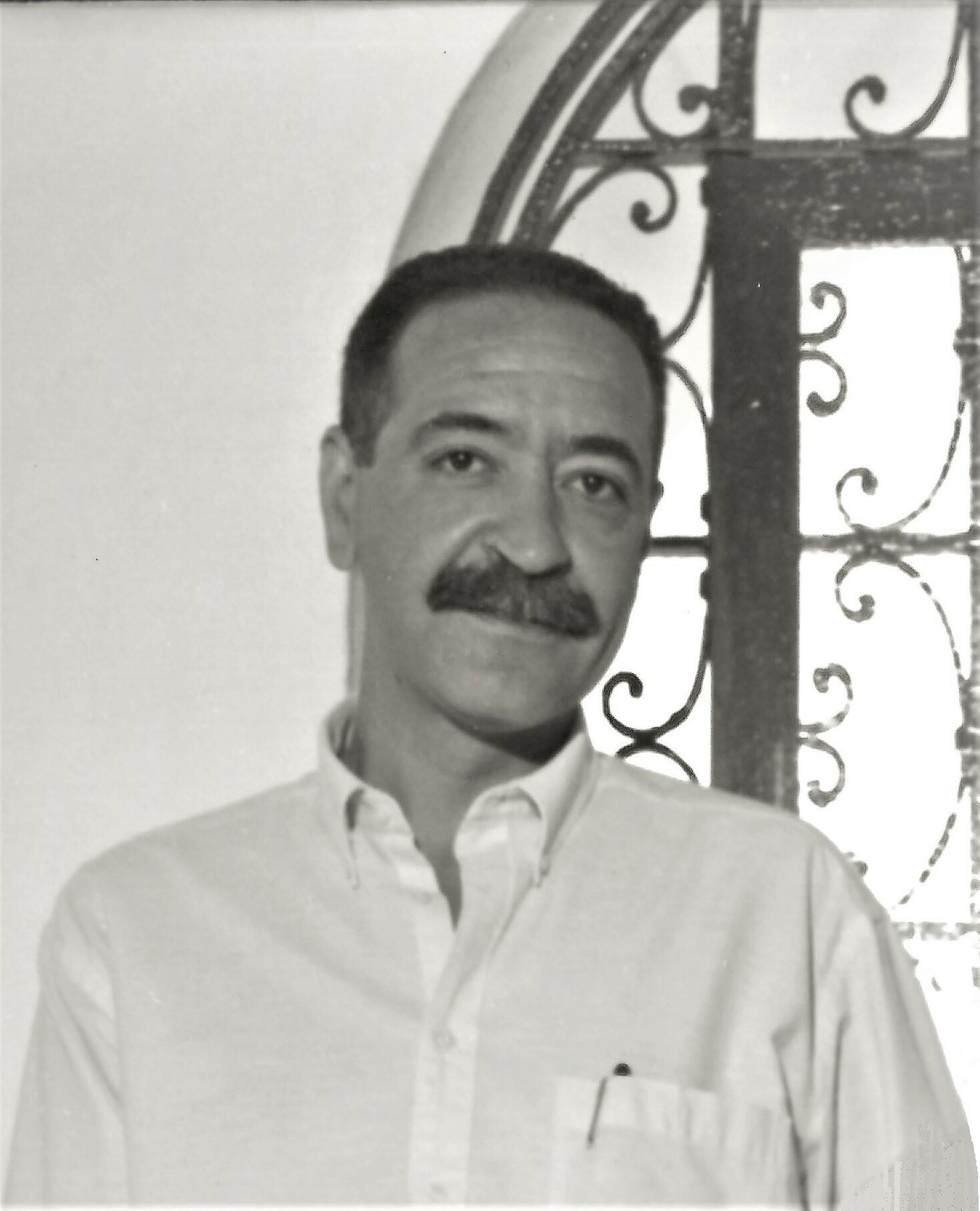 Retrato de Gerardo González de Vega. La Habana, 1991